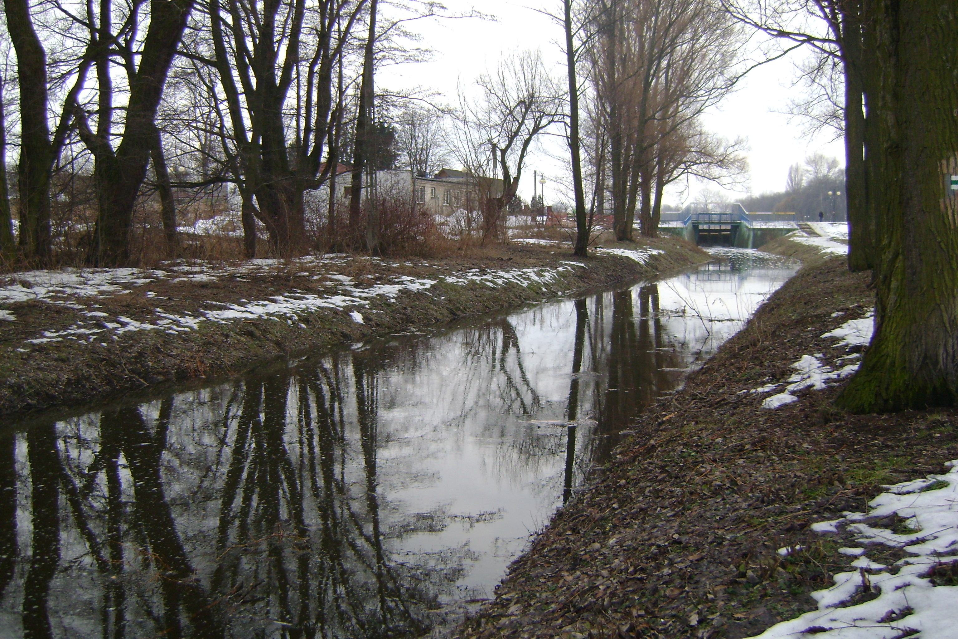 Rzeka Mleczna.